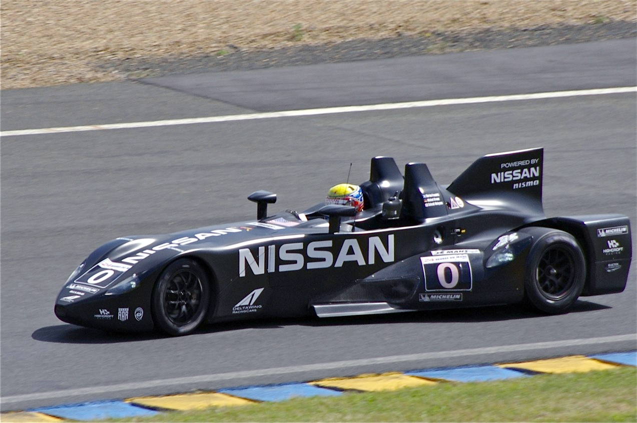 Le Mans 24 Hours, 2012